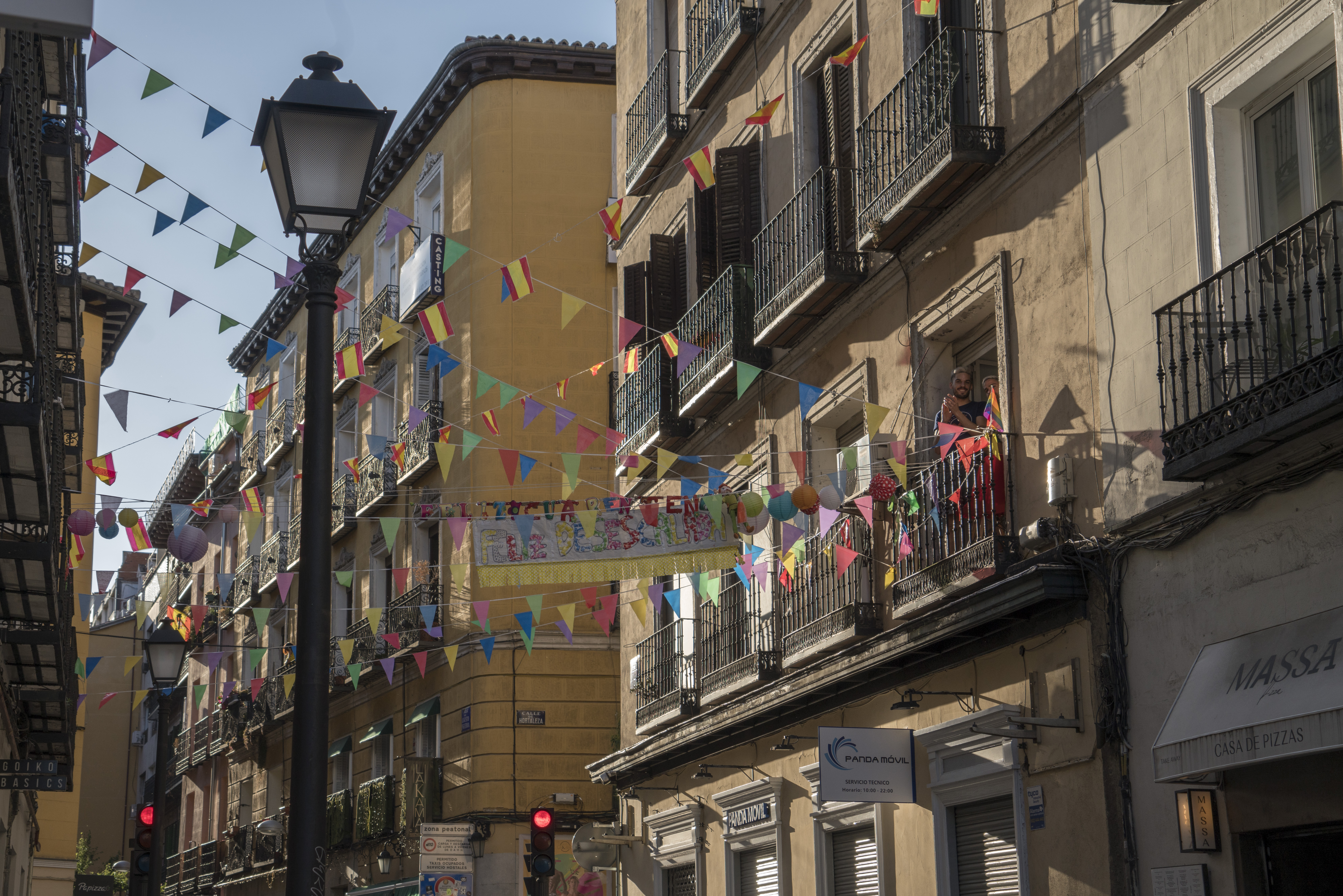 Barrio de Chueca durante el desconfinamiento. Madrid. Mayo de 2020